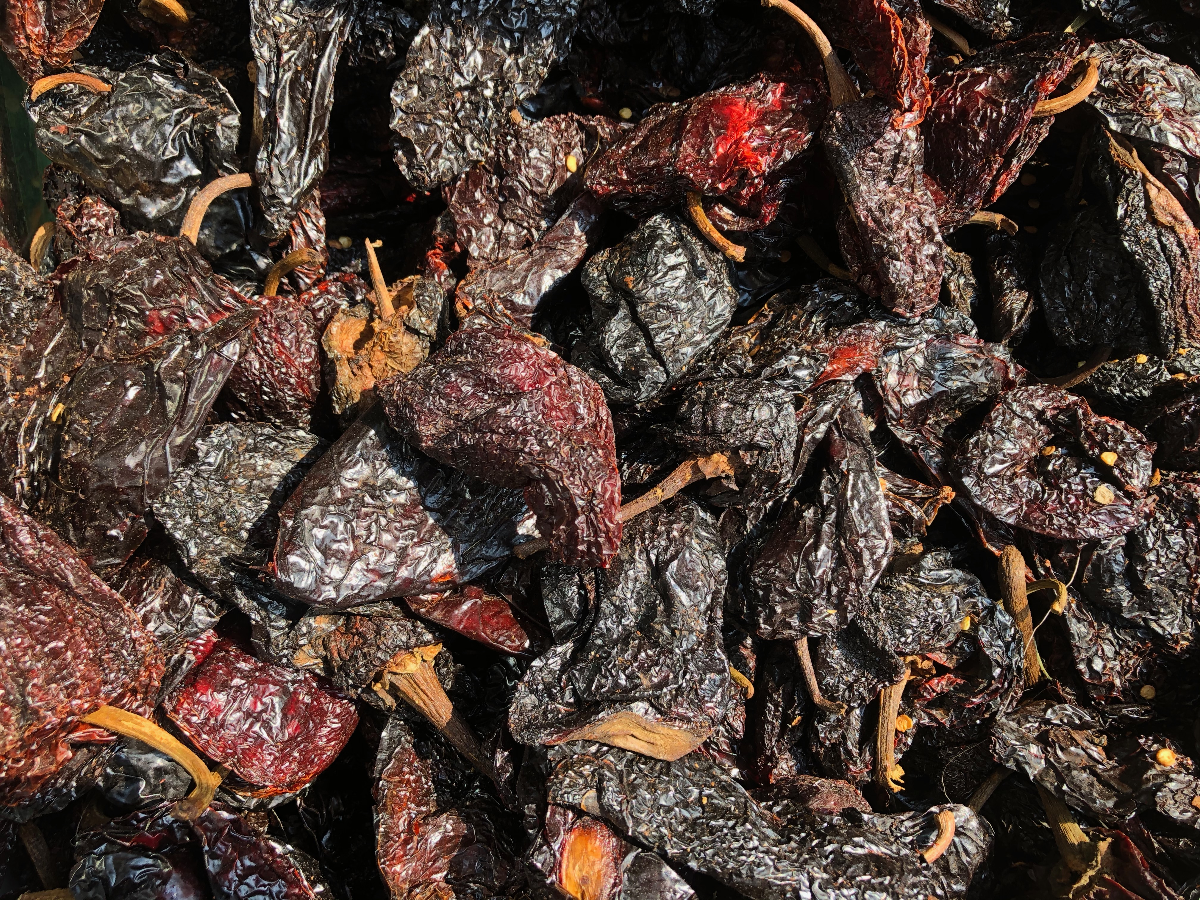 Chile Morita: Chile seco ahumado, parecido al Chipotle, pero con un sabor más agradable. Cultivado en diferentes regiones de México.